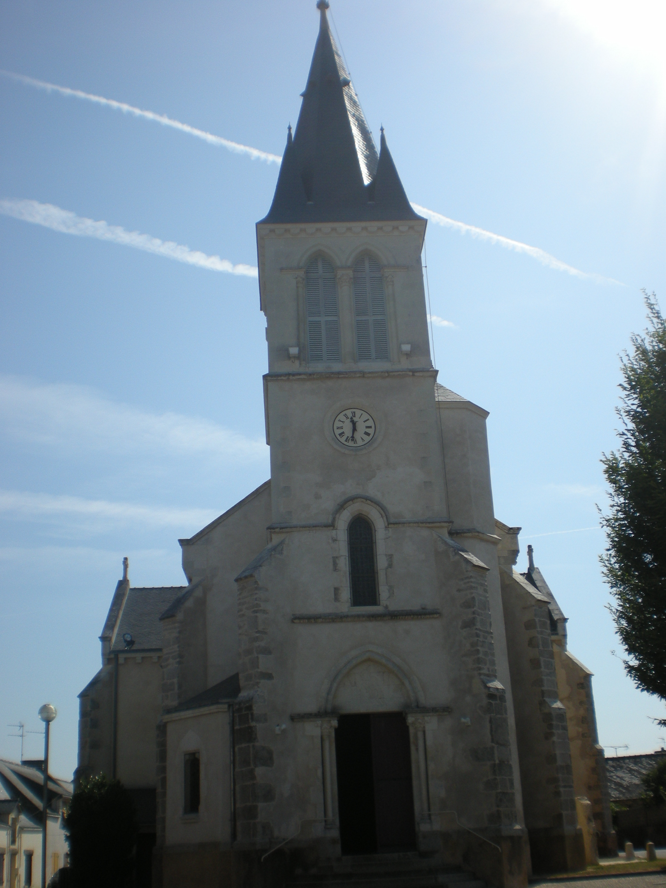 l'église de camoël